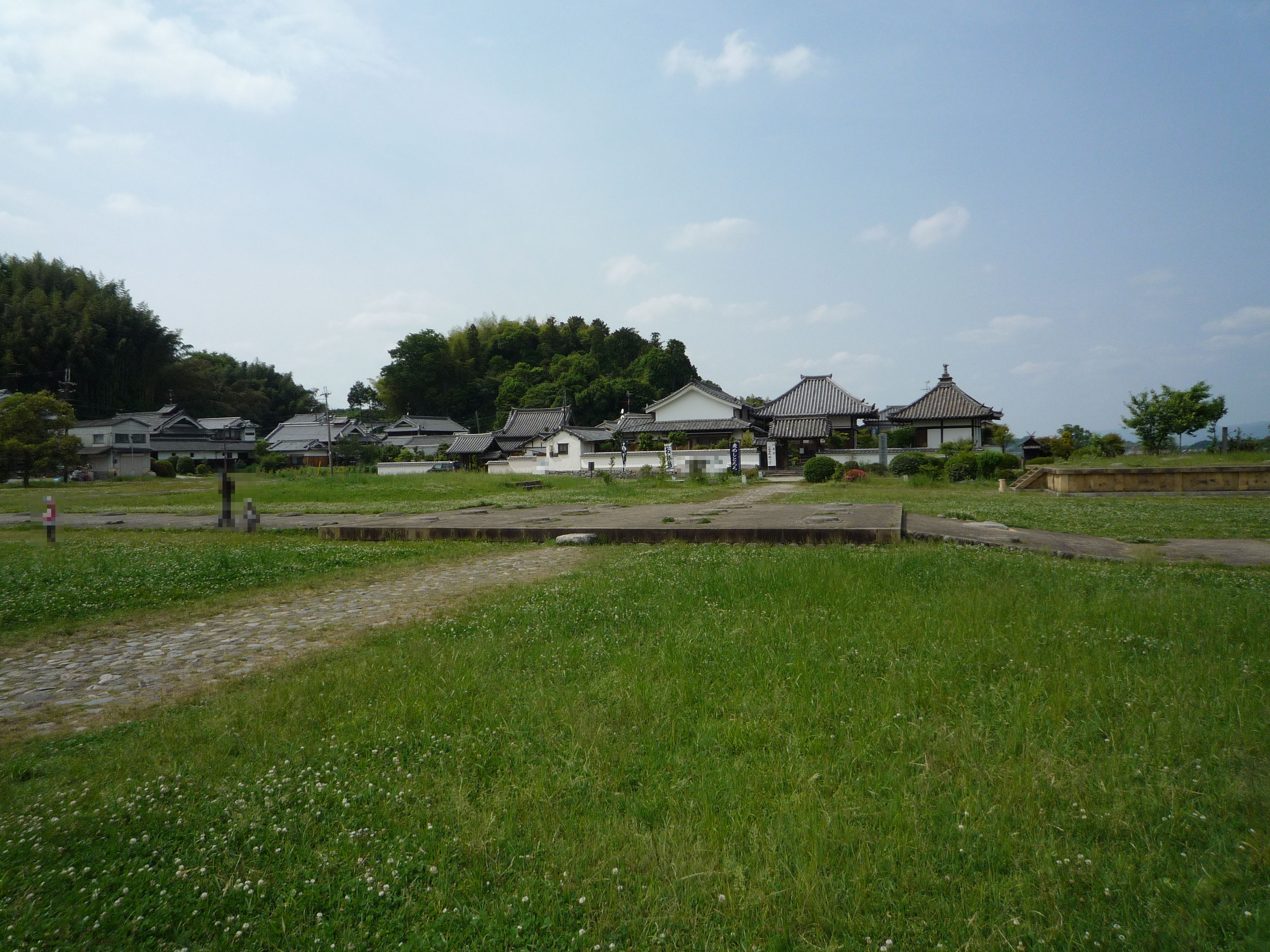 奈良県明日香村 飛鳥川原宮